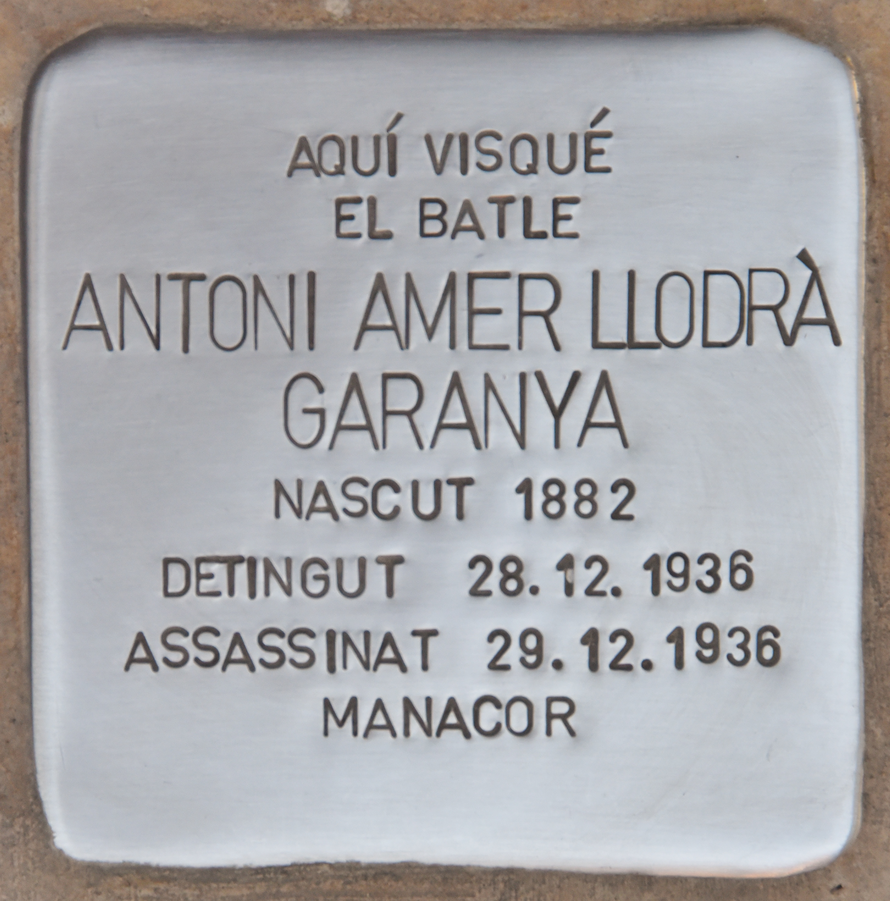 Remembrance Stone für Antoni Amer Llodra Garanya